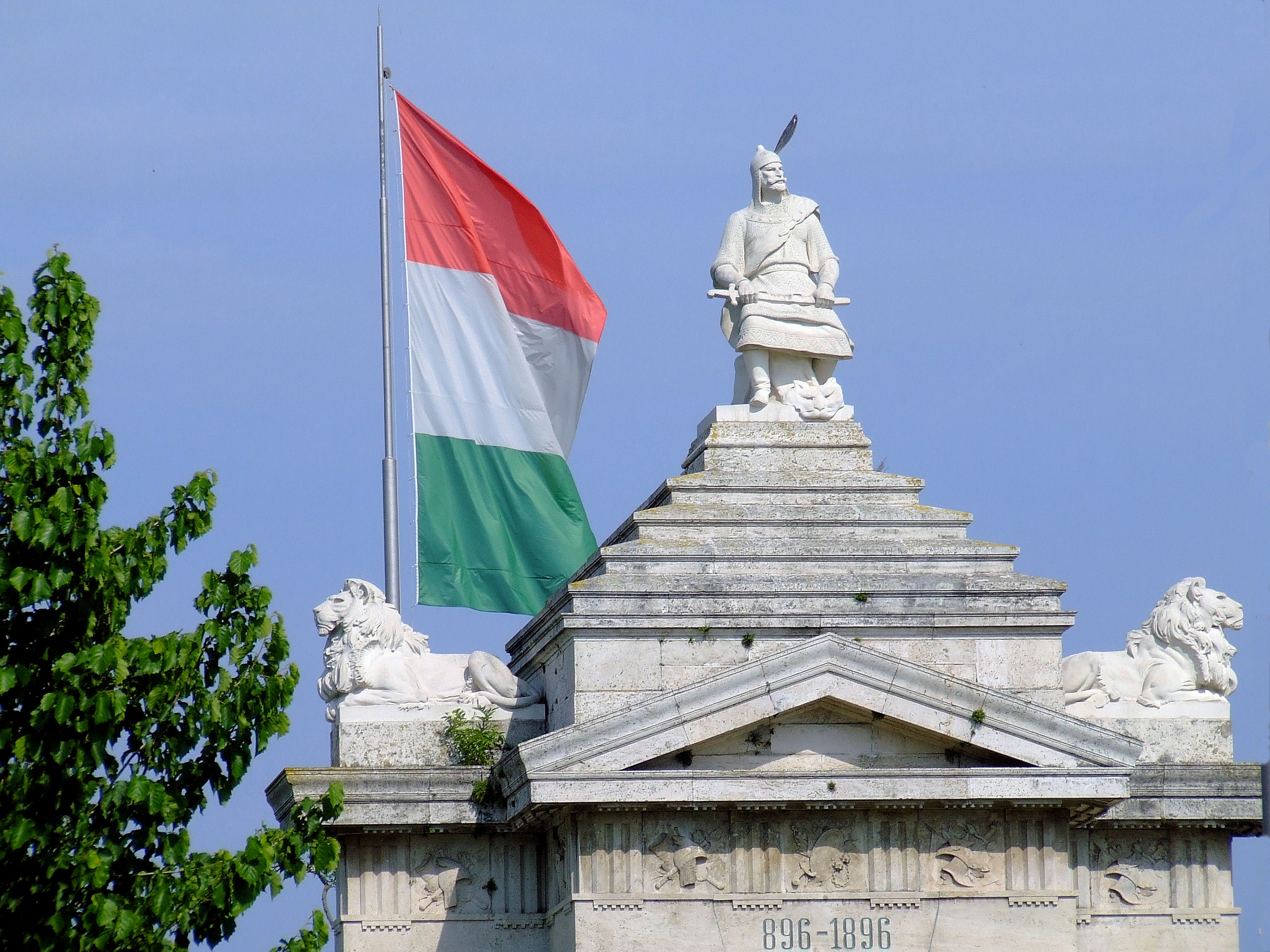 Az Árpád-emlékmű Ópusztaszeren. Berczik Gyula építész és Kallós Ede szobrászművész alkotása. A szobrot 1996-ban Buzál Károly faragta újra.